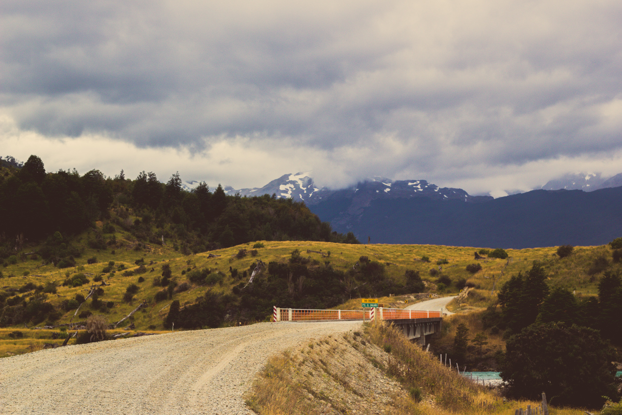 Puente colgante Yelcho, Carretera Austral, Chile